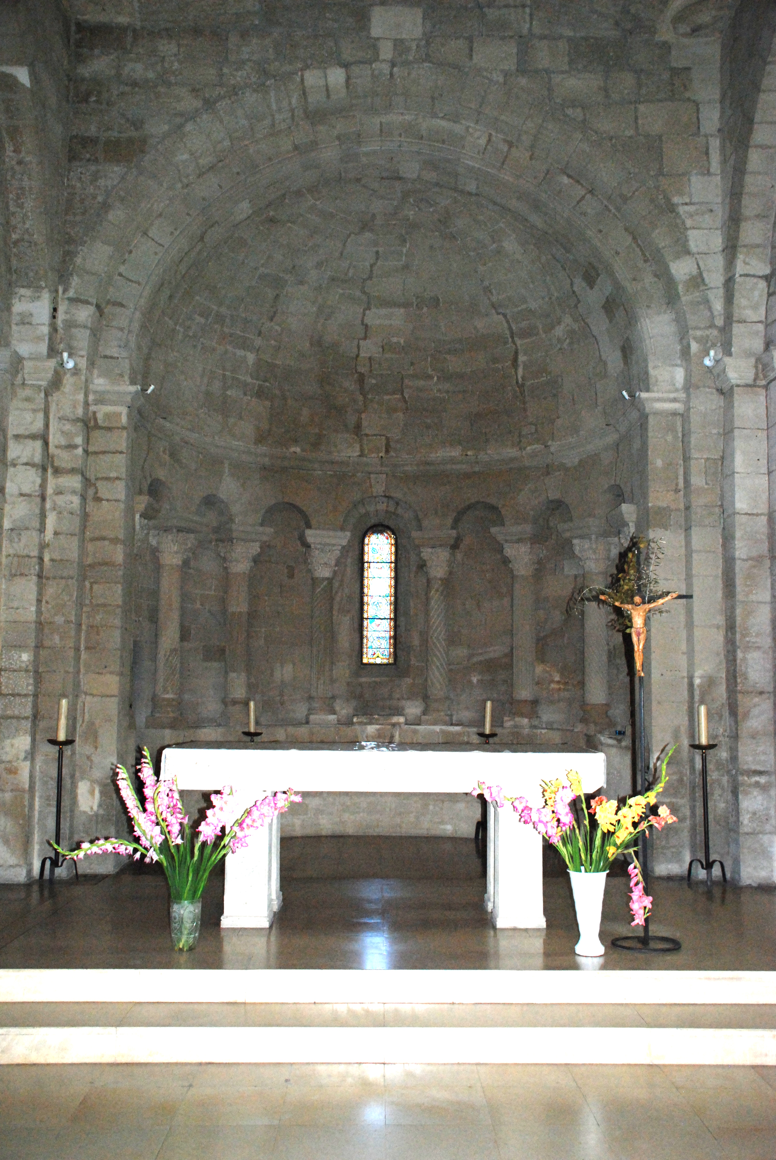 France - Provence - Église Notre-Dame-de-Grâce de Graveson